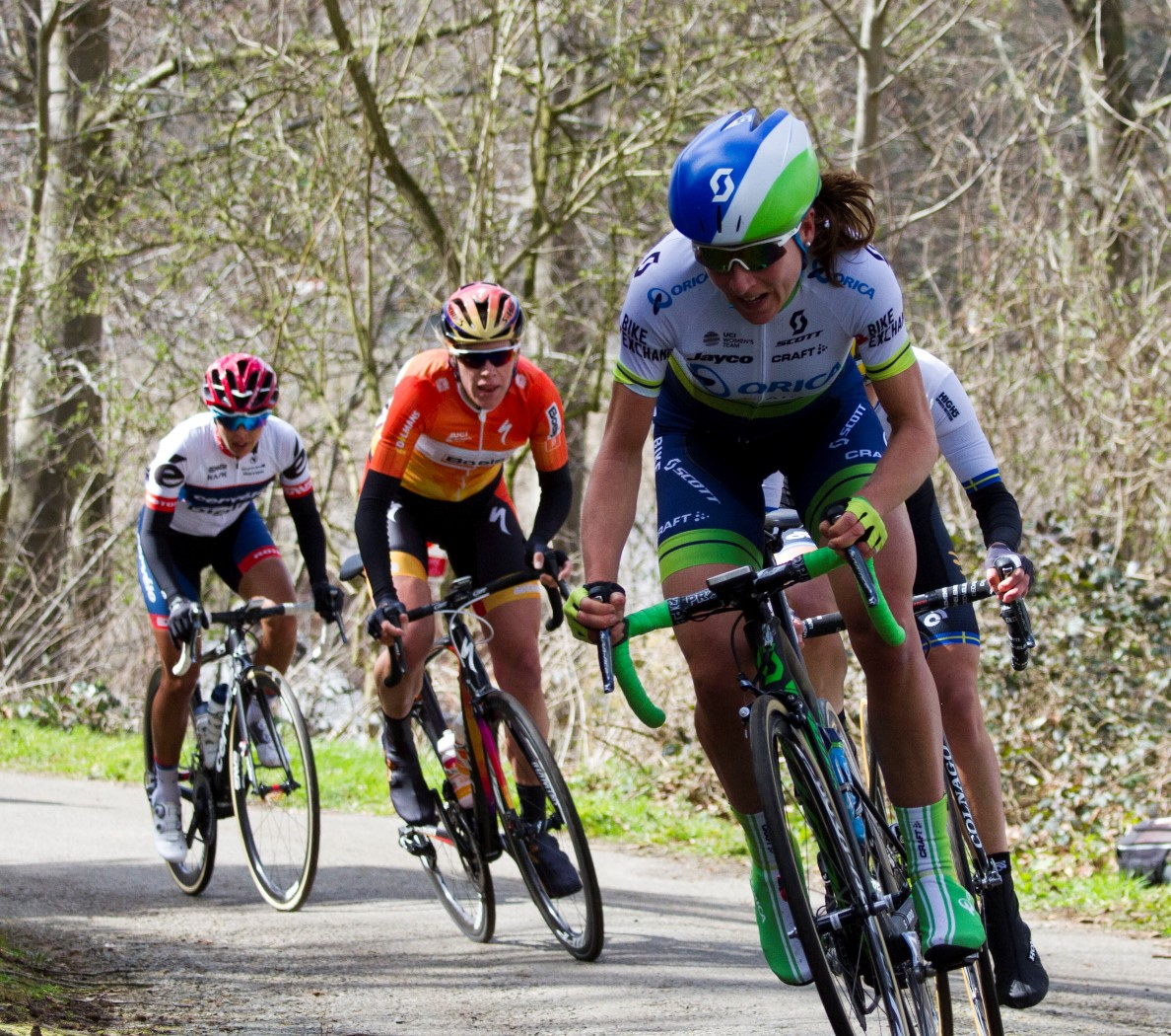 001 van vleuten